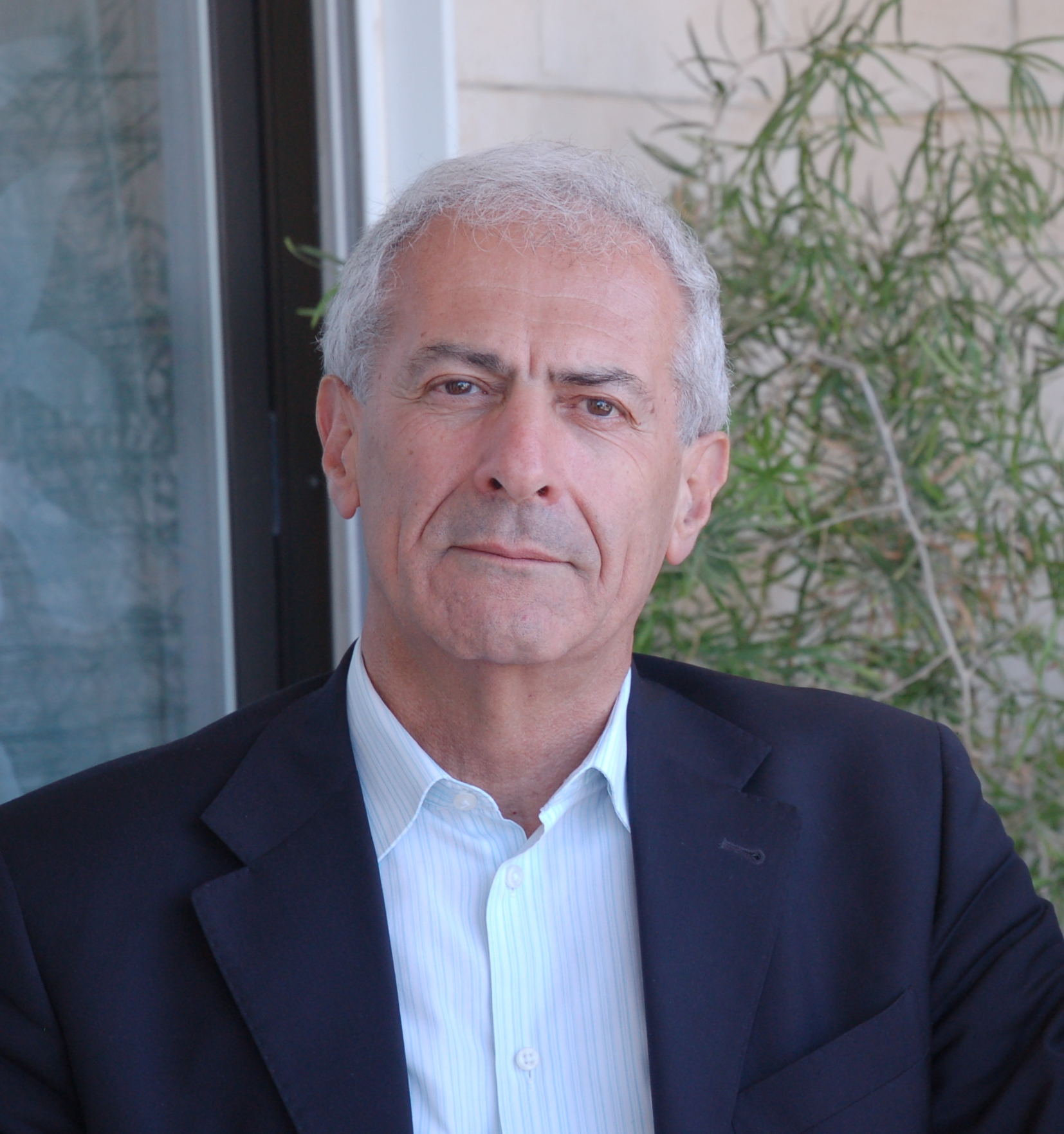 פרופסור סרג'ו דלה-פרגולה